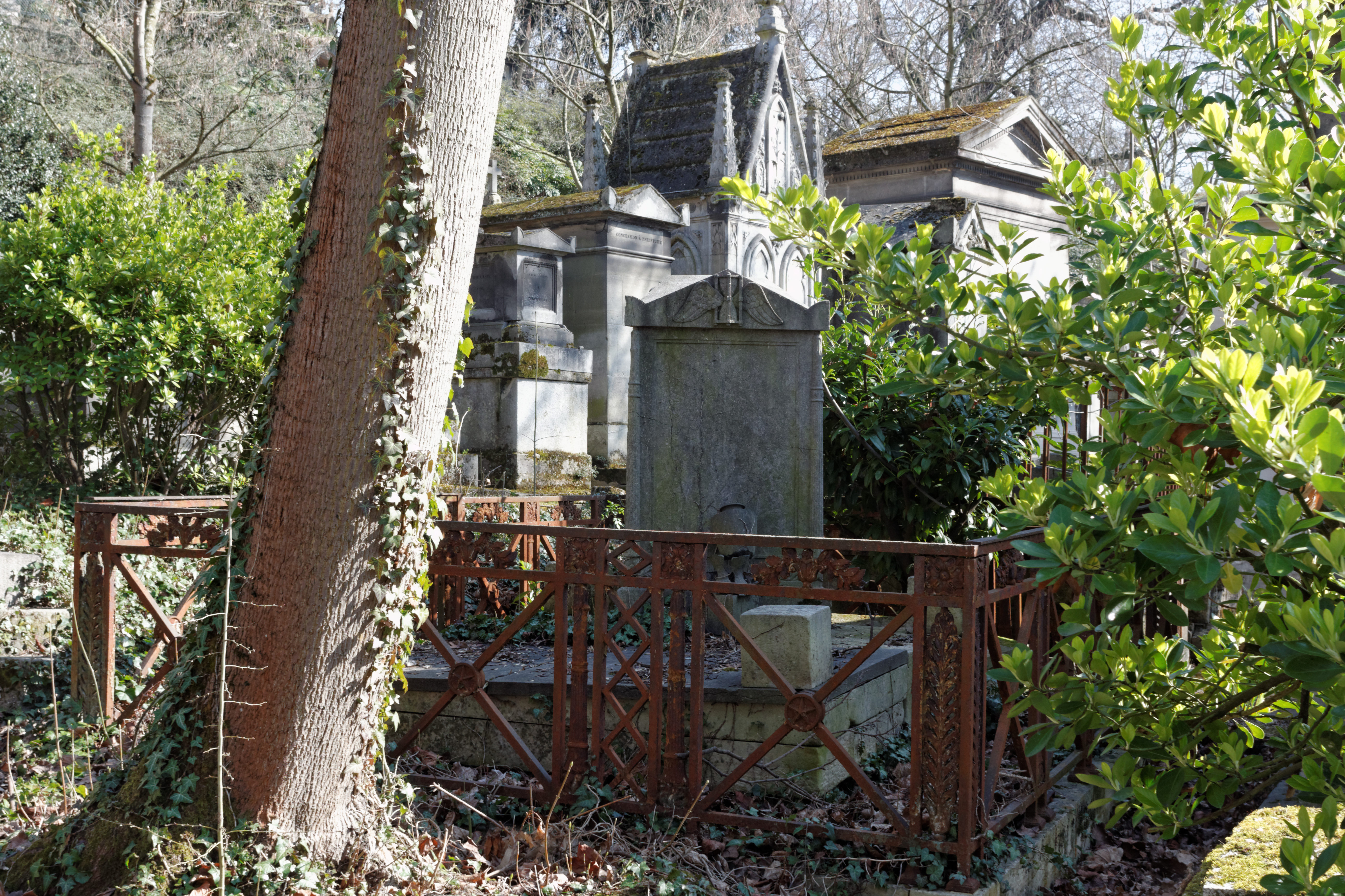 Sépulture de Nicolas-Éloi Lemaire (1767-1832), homme politique et philologue français.